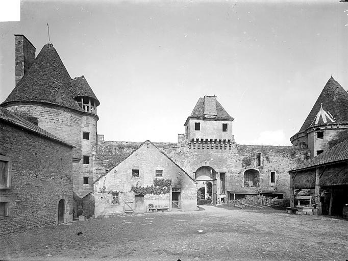 Innenhof des Schlosses Posanges